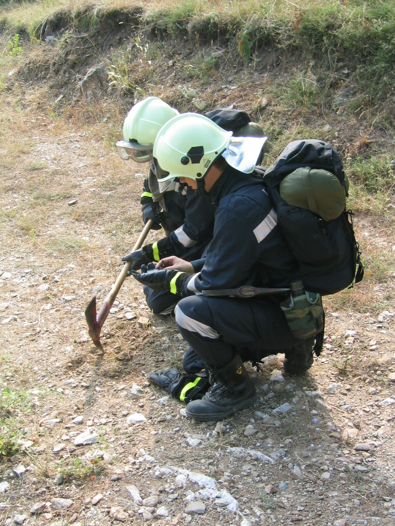 ESEPA-Teilnehmer beim Training